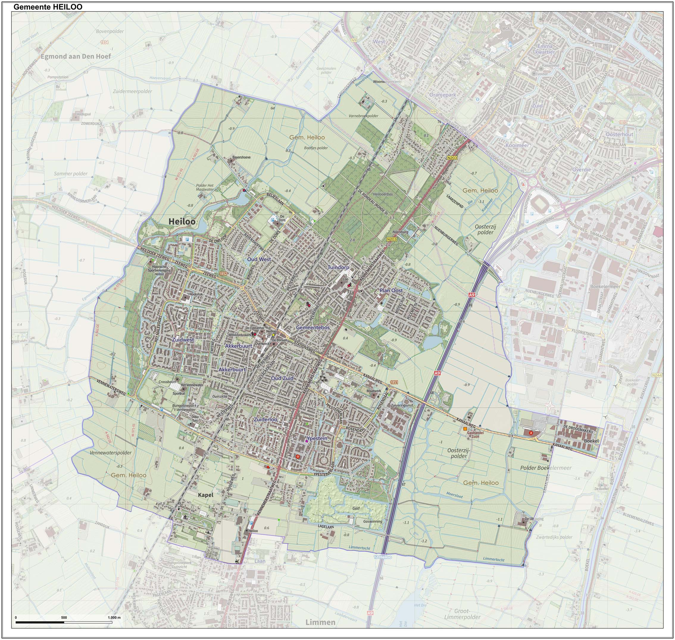 Topografische gemeentekaart. Resolutie: 400 pixels/km. Kaartbeeld samengesteld uit de open geodata van de Top10NL en Top25namen (Kadaster), Creative Commons-BY licentie. Gebouwvlakken uit open geodata BAG extract. Wegen uit de OpenStreetMap, OpenStreetMap community. Reliëfschaduw uit de Actuele Hoogtekaart AHN2. Samenstelling en kleurenschema: Jan-Willem van Aalst, met QGIS. Zie ook de Legenda.